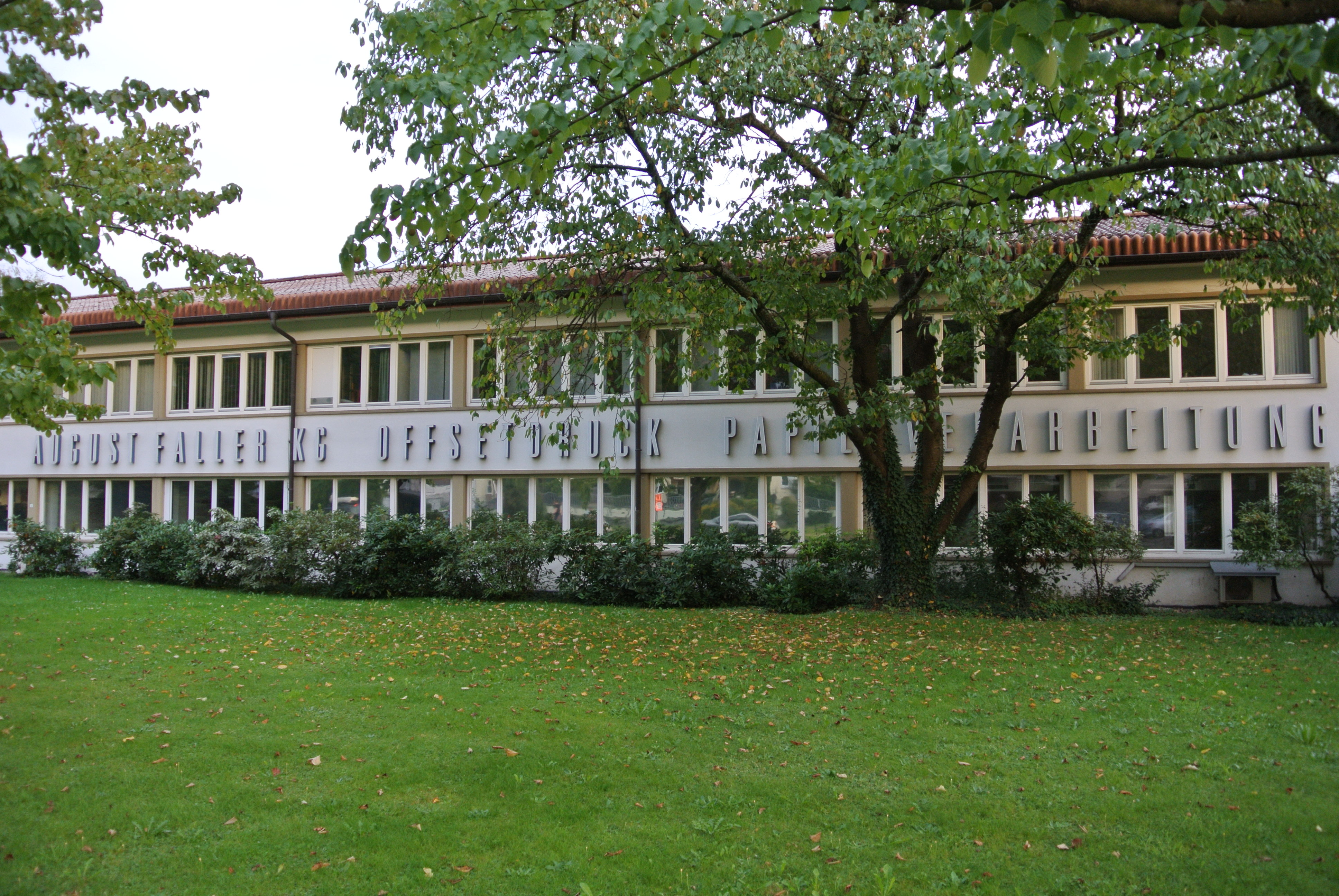 August Faller KG